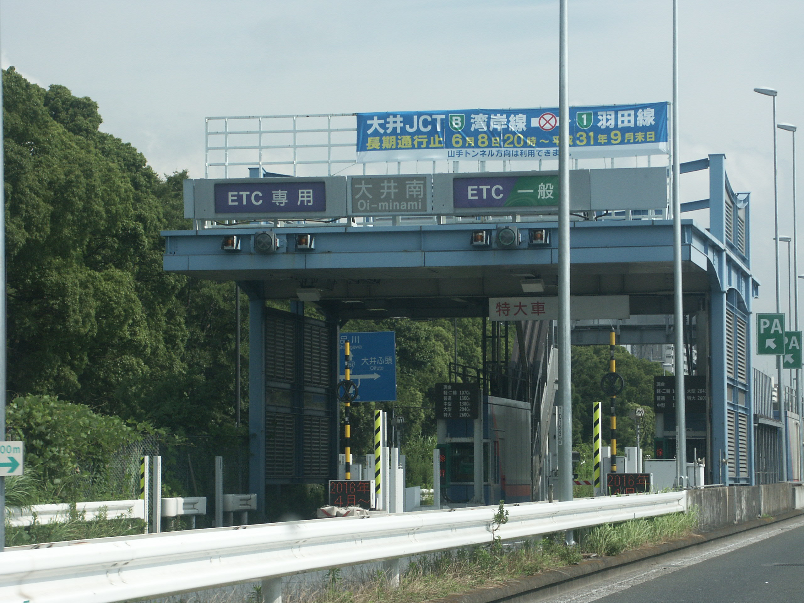 首都高速湾岸線東行き大井南出口料金所